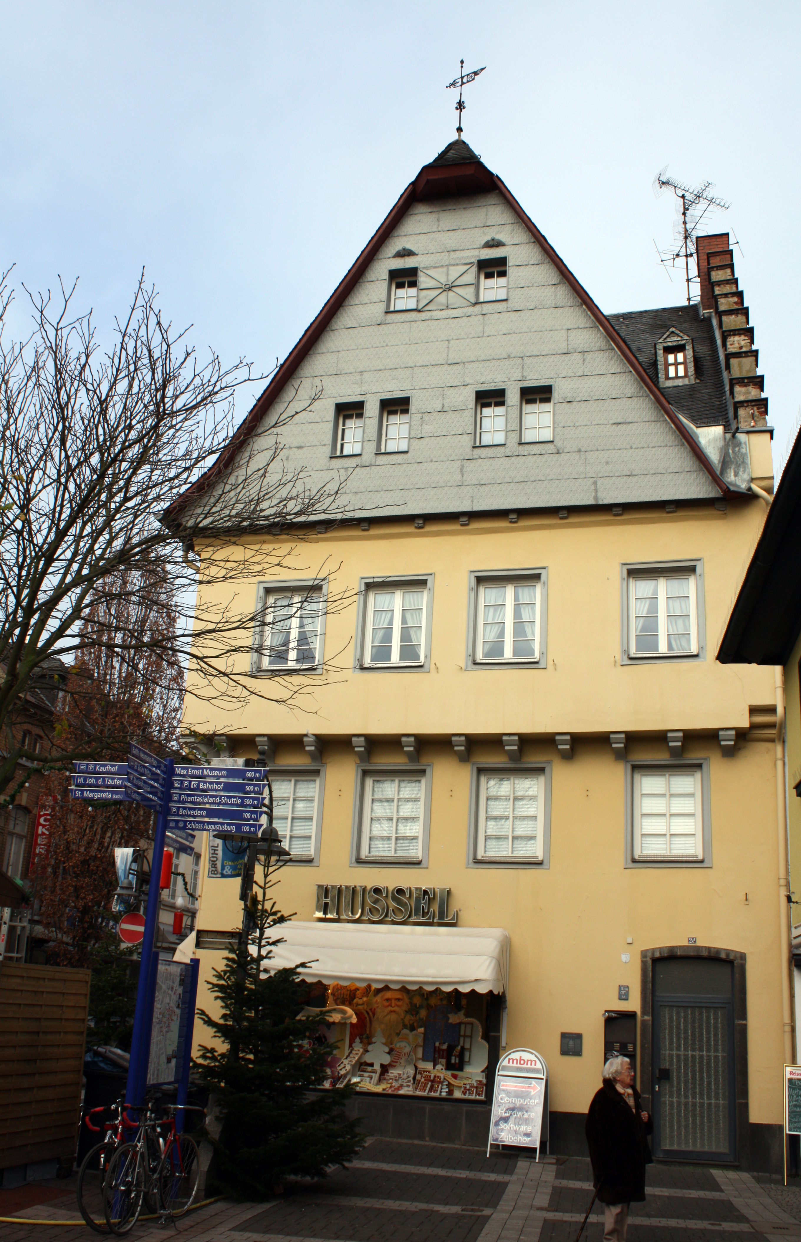 Brühl, Markt 28. Haus zum Stern, erbaut 1530/31